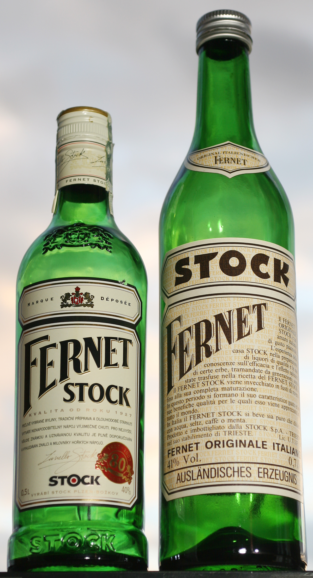 Fernet Stock, tschechisch und italienisch